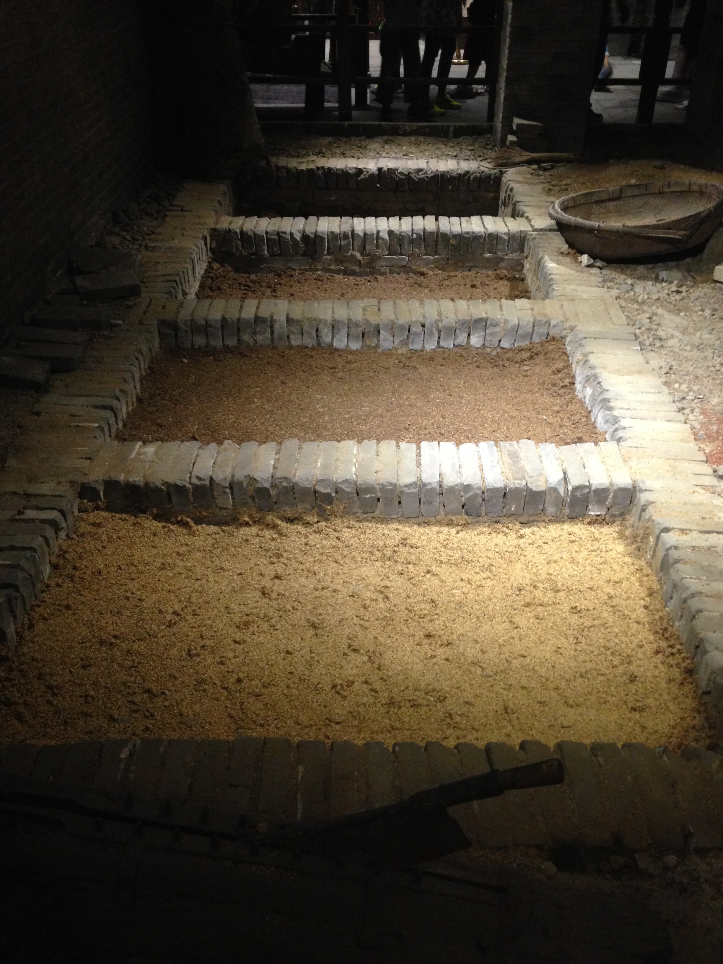 源昇号博物館・白酒醸造用の発酵窖